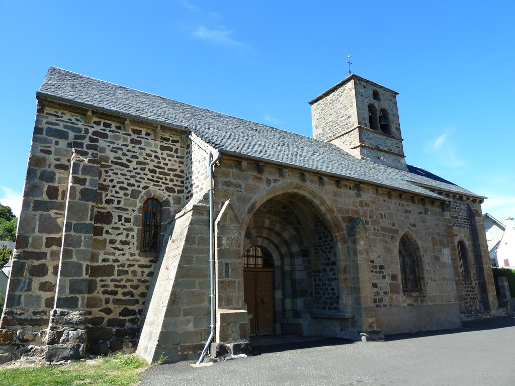 Église du village de Vèze, Cantal, France